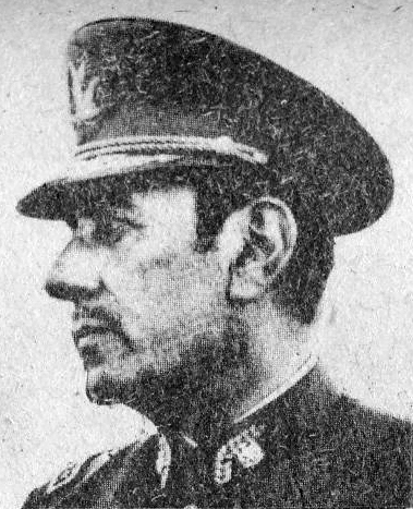 Carlos Prats